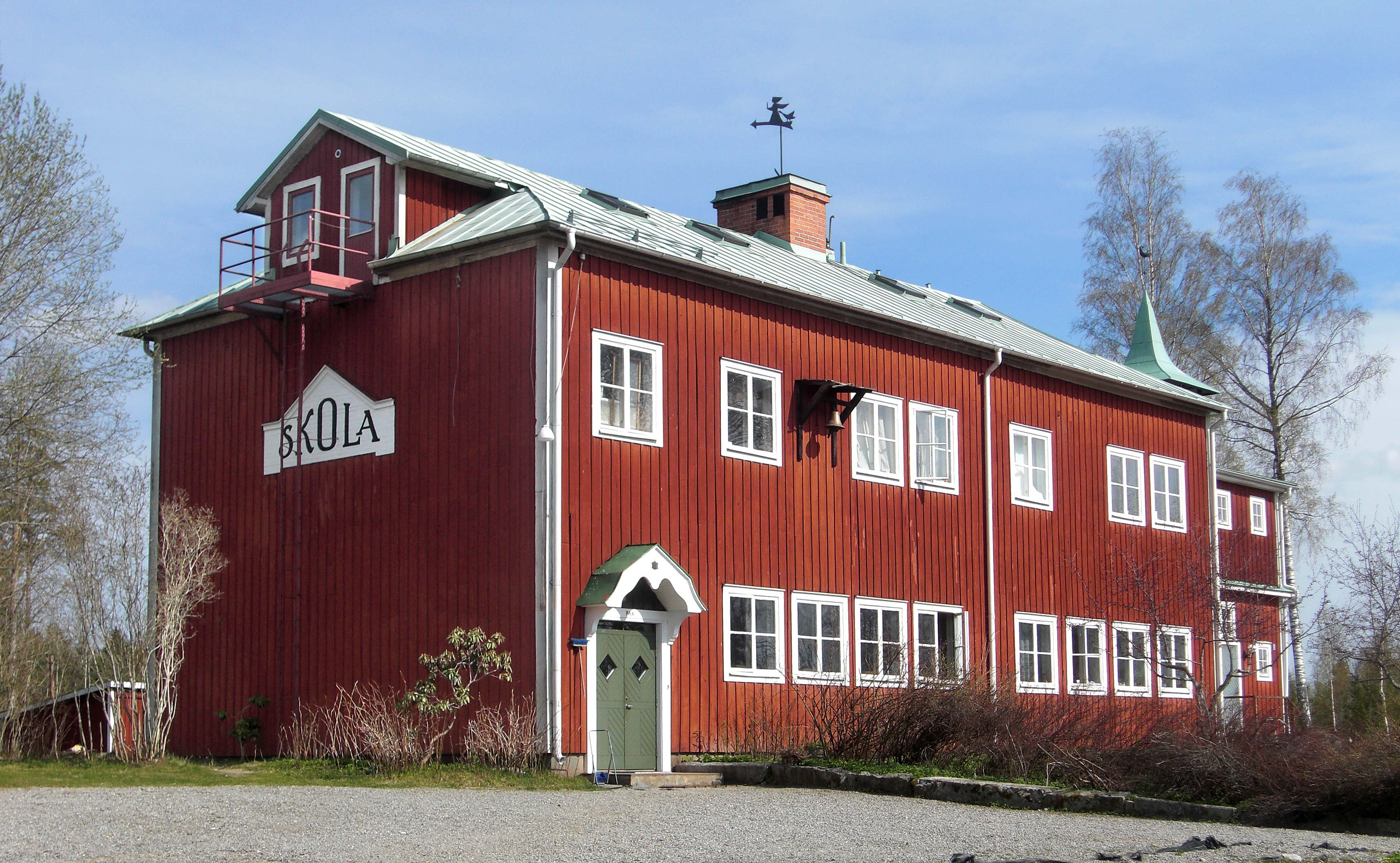 Östanbäcks kloster i Sala kommun, Västmanlands län, Västmanland, Sverige. Mellan åren 1926 och 1967 var byggnaden en skola. Efter några år som madrassfabrik köptes skolbyggnaden 1970 av Stiftelsen Heliga Korsets Brödraskap.